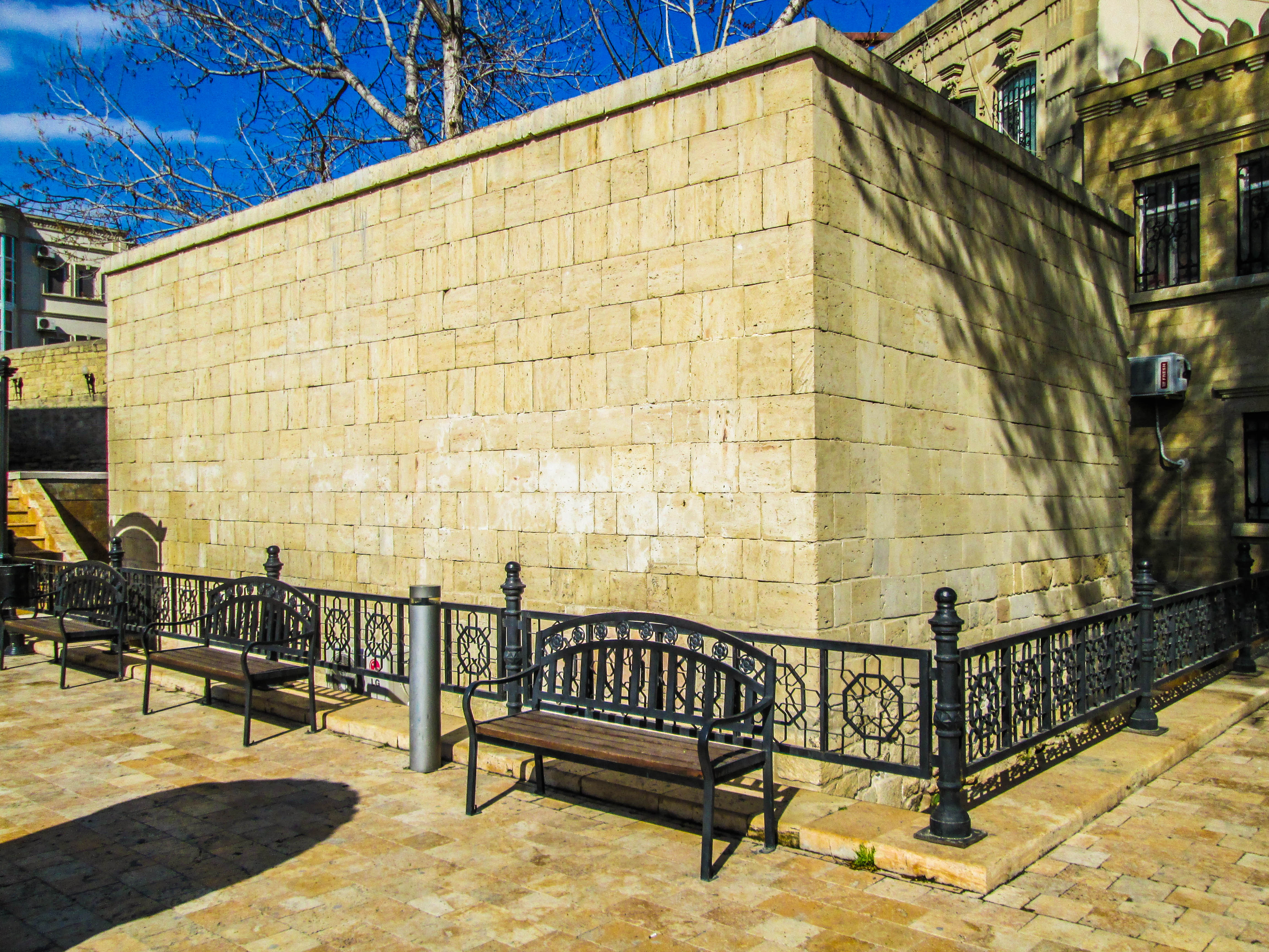 Çin məscidinin yandan görünüşü